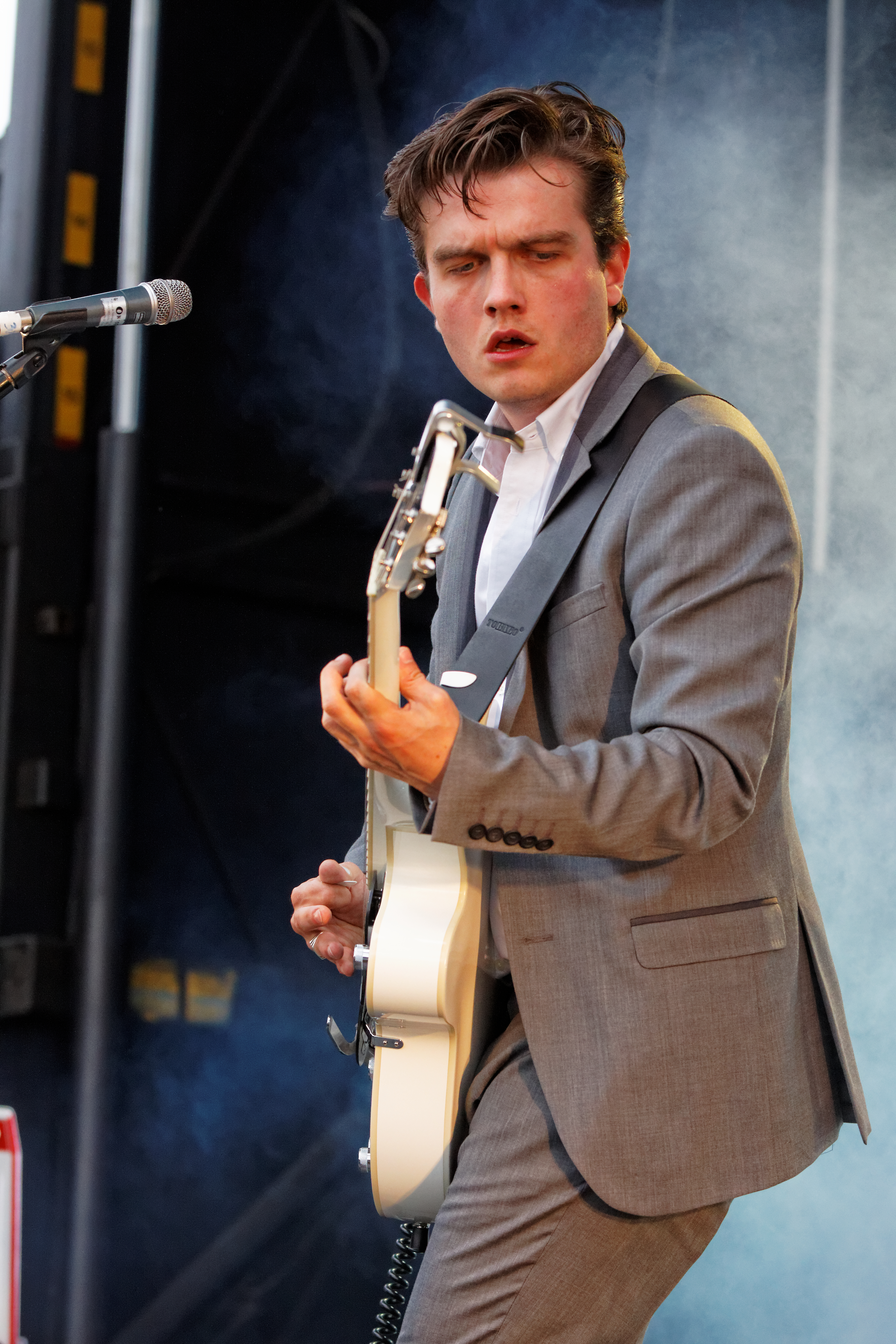 Mustang en concert sur la scène Zebrock lors de la fête de l'Humanité 2012.